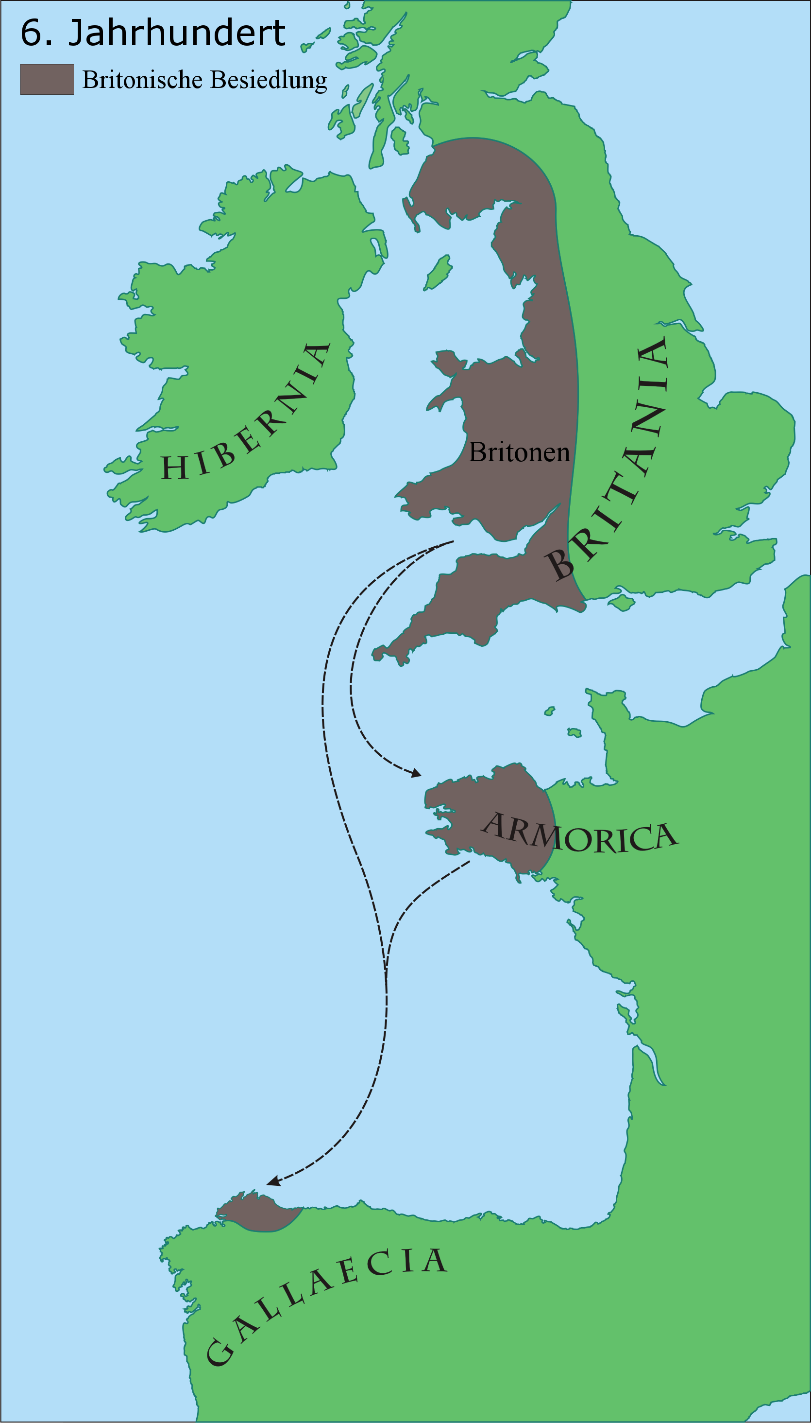 Britonen im 6.Jahrhundert. Eine Übersetzung des Bildes